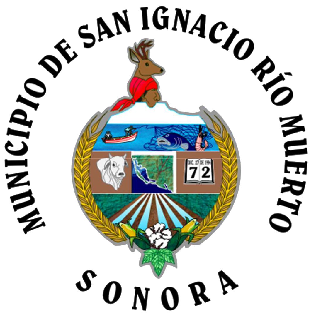 Escudo del municipio sonorense.